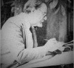 Exequiel Fontecilla Larraín, (Santiago de Chile 15 de noviembre de 1916 - 12 de enero de 1988). Fue un acuarelista y arquitecto chileno.